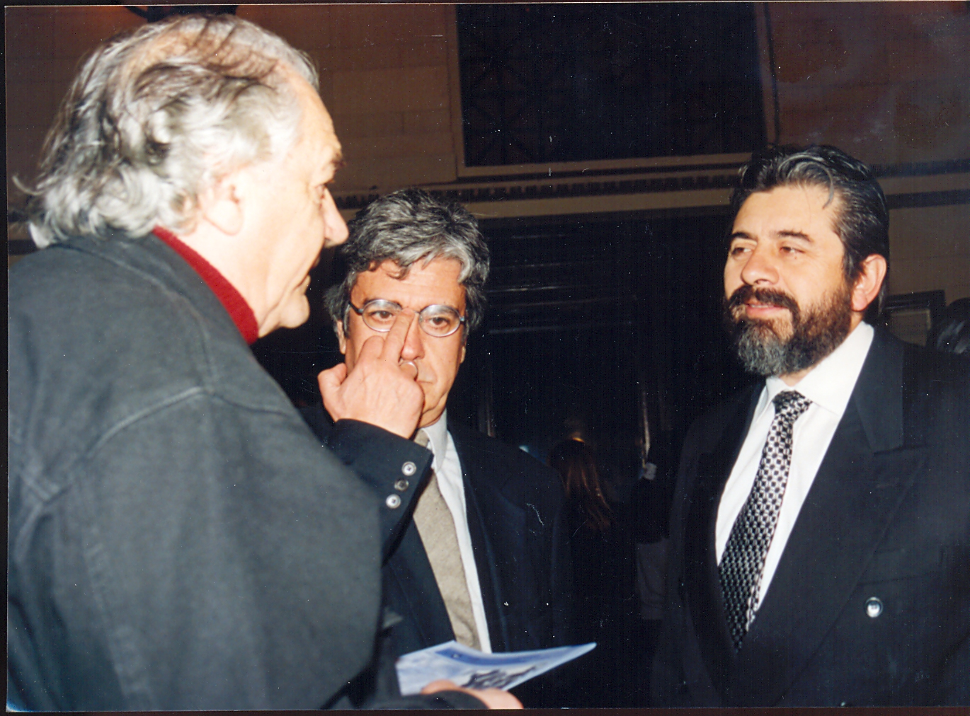 Claudio Di Girolamo, Eugeni Llona y Roberto Poblete; Invitados especiales; año 1998